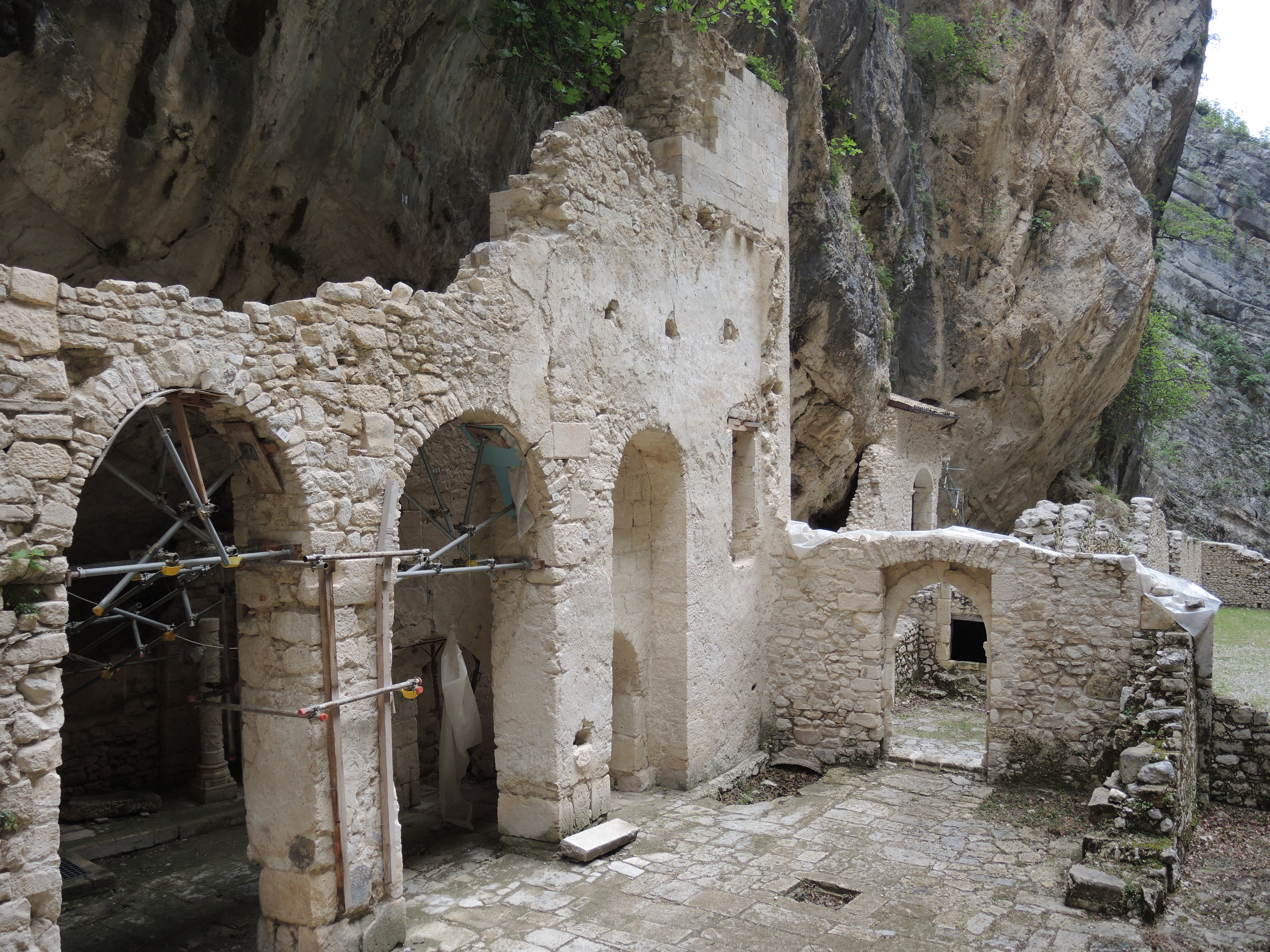 Fara San Martino: Abbazia di San Martino in Valle